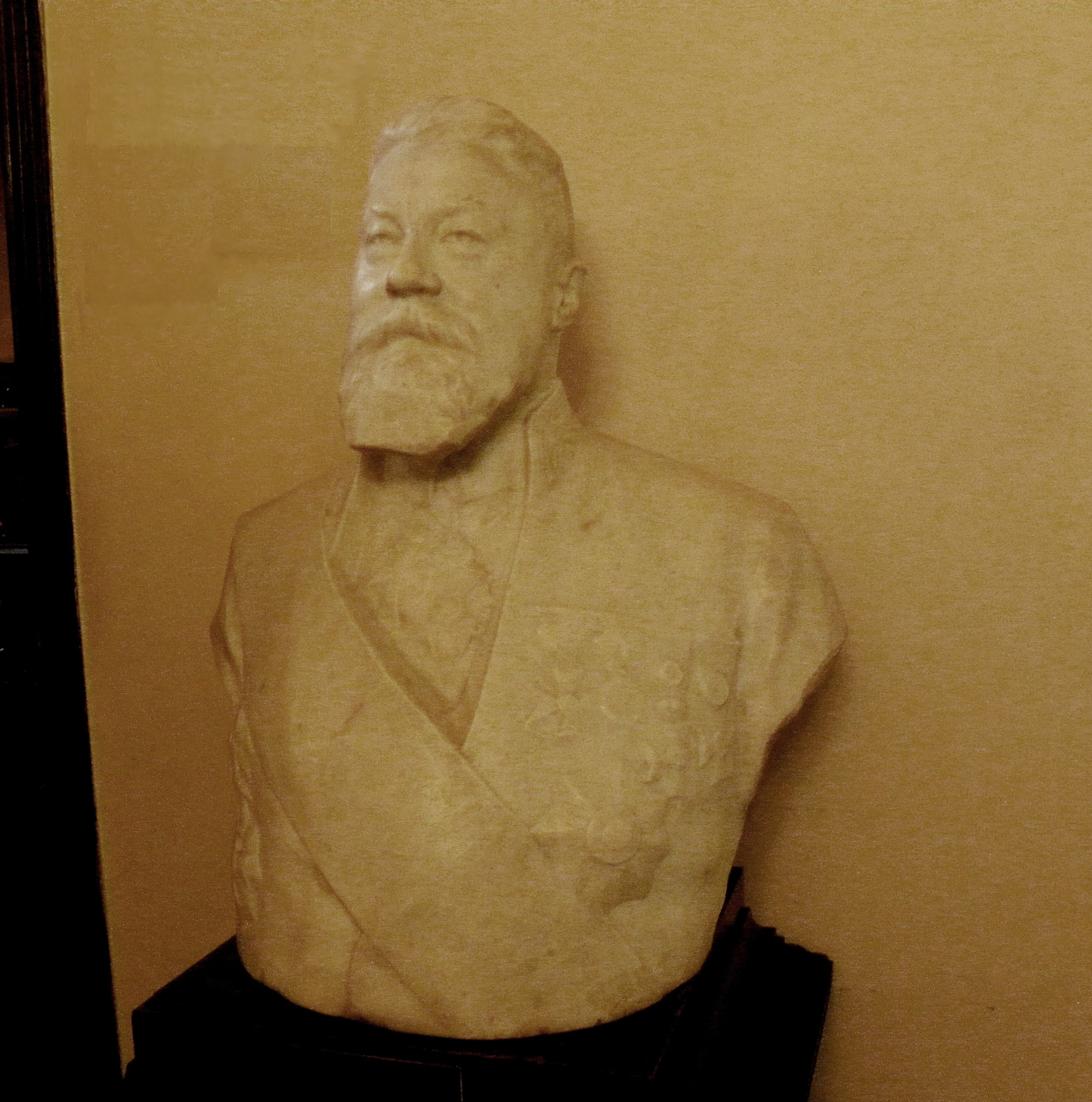 Buste en marbre blanc de Emile Braun (1895-1921). Hôtel de Ville de Gand, entrée de la salle du Conseil.